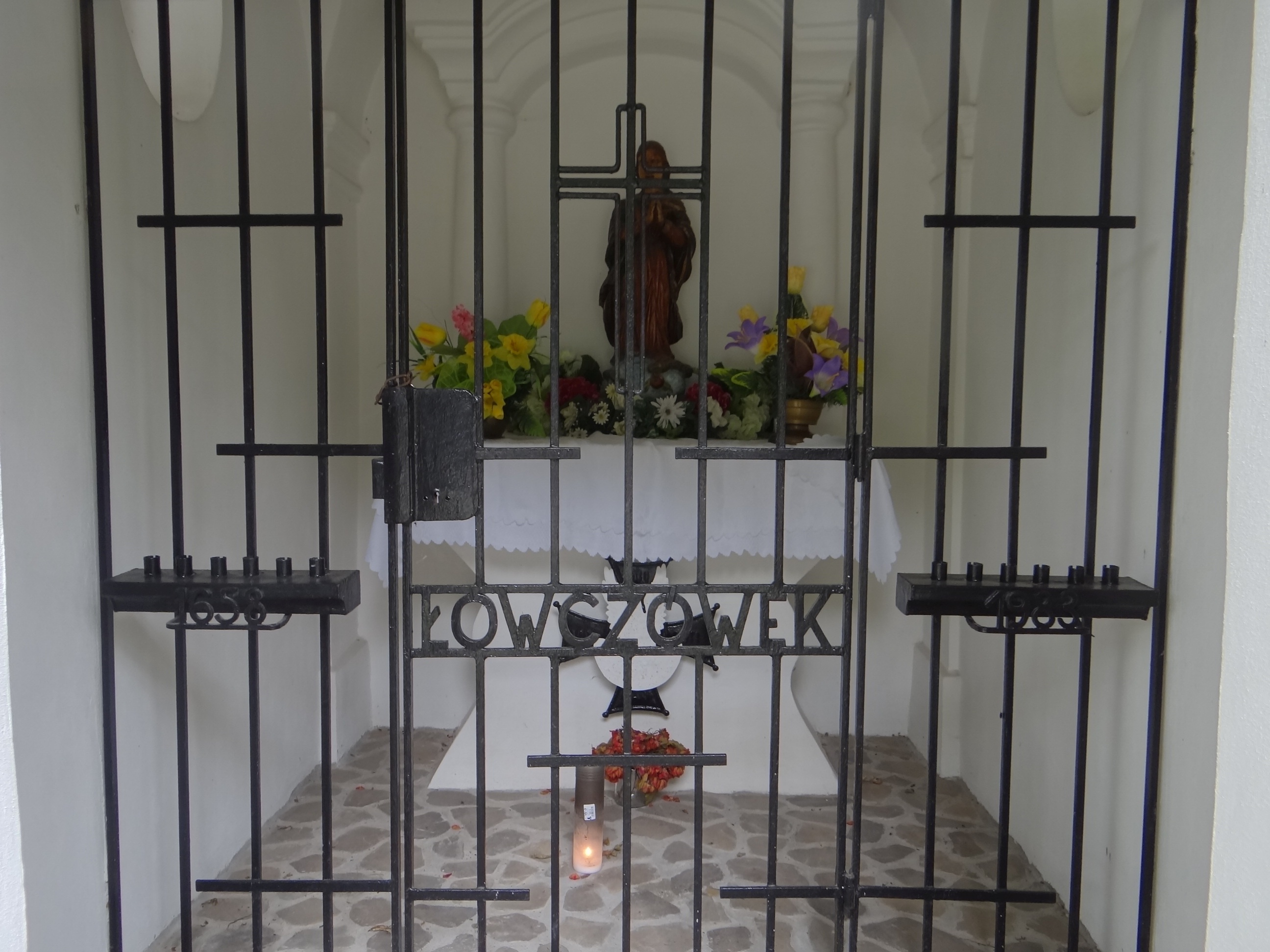 Cmentarz wojenny nr 172 – Łowczówek